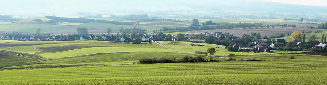 Nettelrede